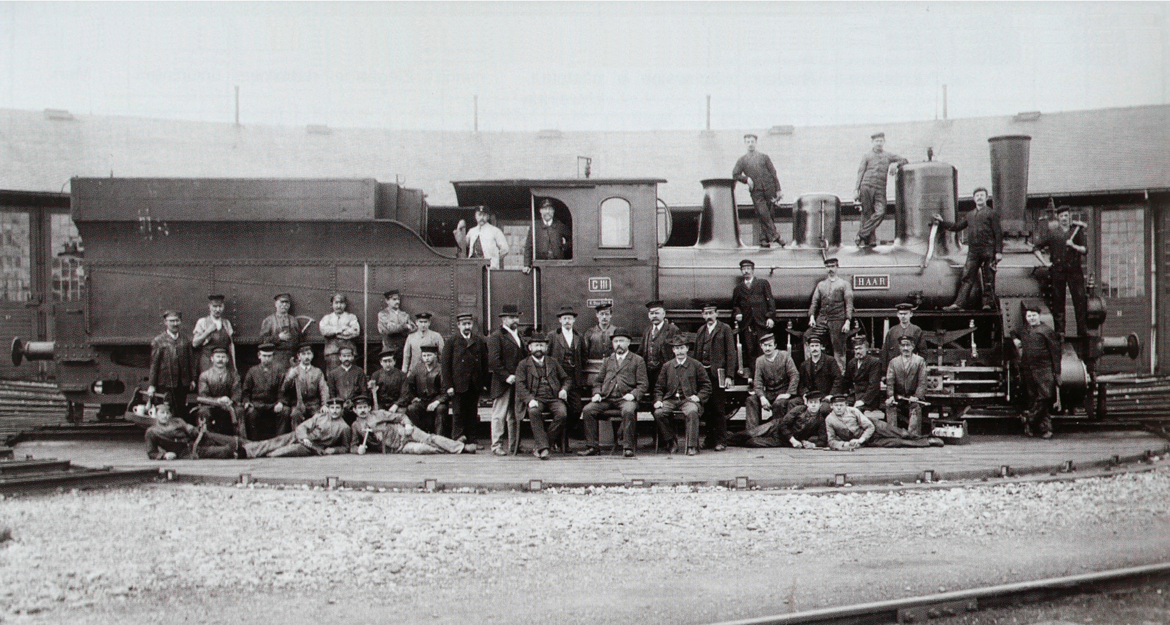 Güterzuglokomotive C III Nr. 598 HAAR der Bauart Sigl auf der 15-Meter-Drehscheibe der bayerischen Betriebswerkstätte Simbach, davor das versammelte Personal der Betriebswerkstätte. Die 1874 gebaute Lokomotive hatte gerade einen neuen Kessel erhalten.